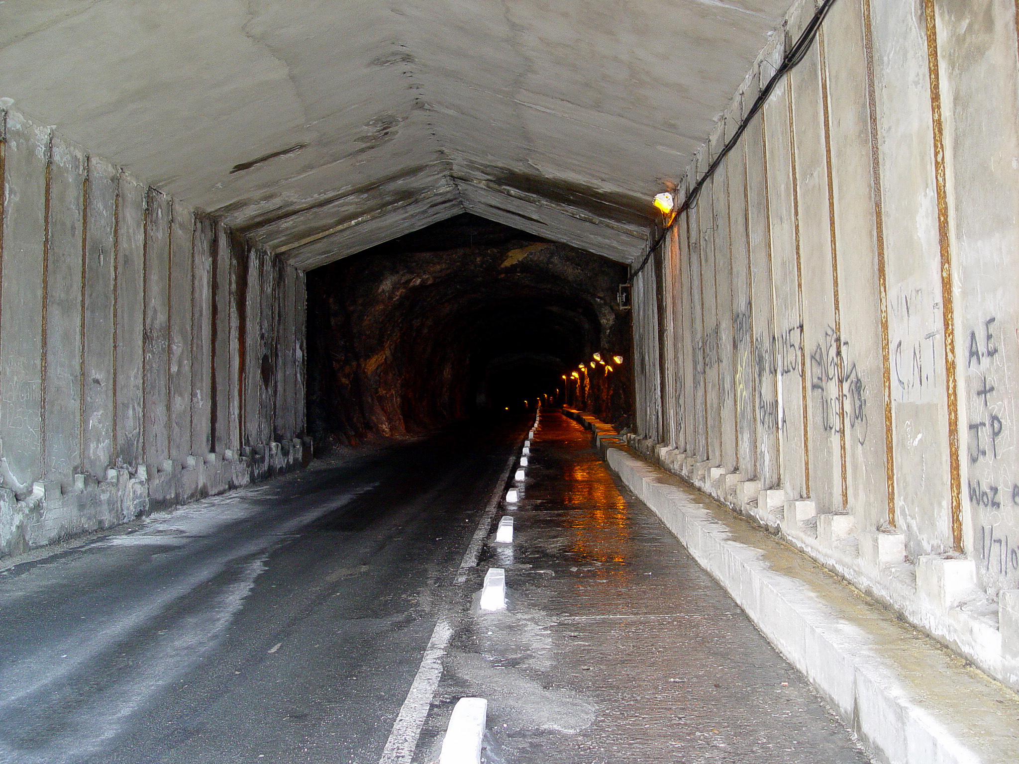 Gibraltar road tunnel